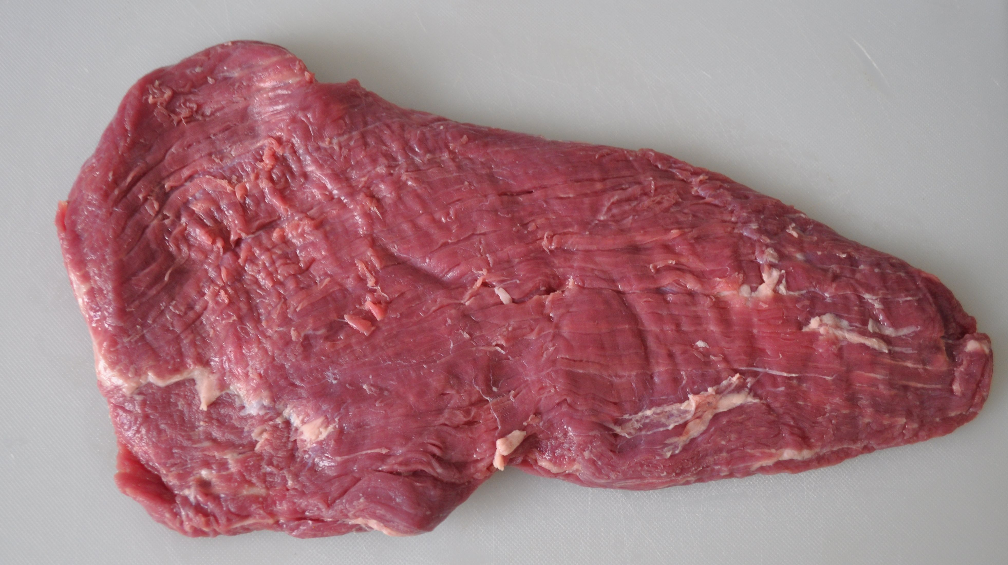 In Deutschland gekauftes, aus Uruguay stammendes rohes Stück Flank Steak nach dem Auspacken. Gewicht 653 g. Dicke ca. 2 cm (Spitze) bis ca 3 cm am breiten Ende.